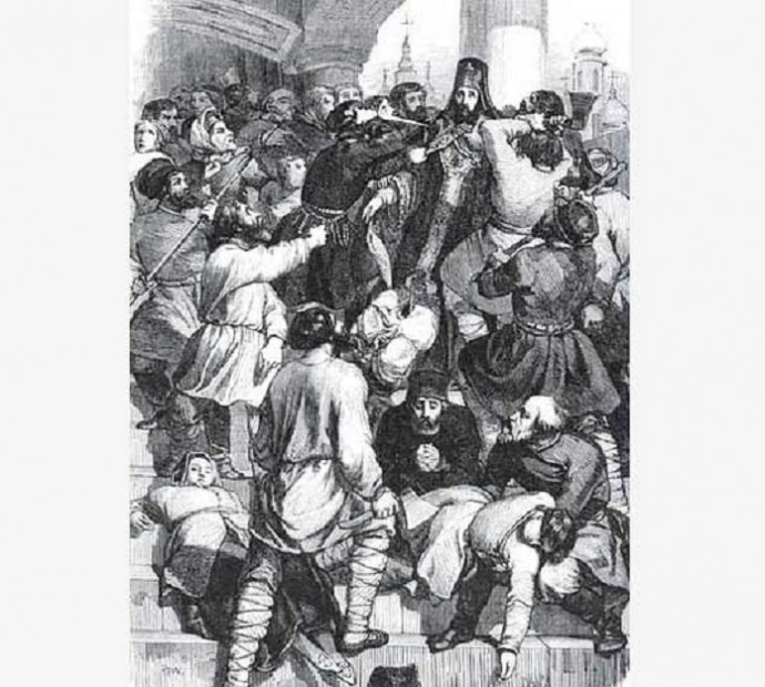 Чумной бунт в Москве (1771): убийство Амвросия